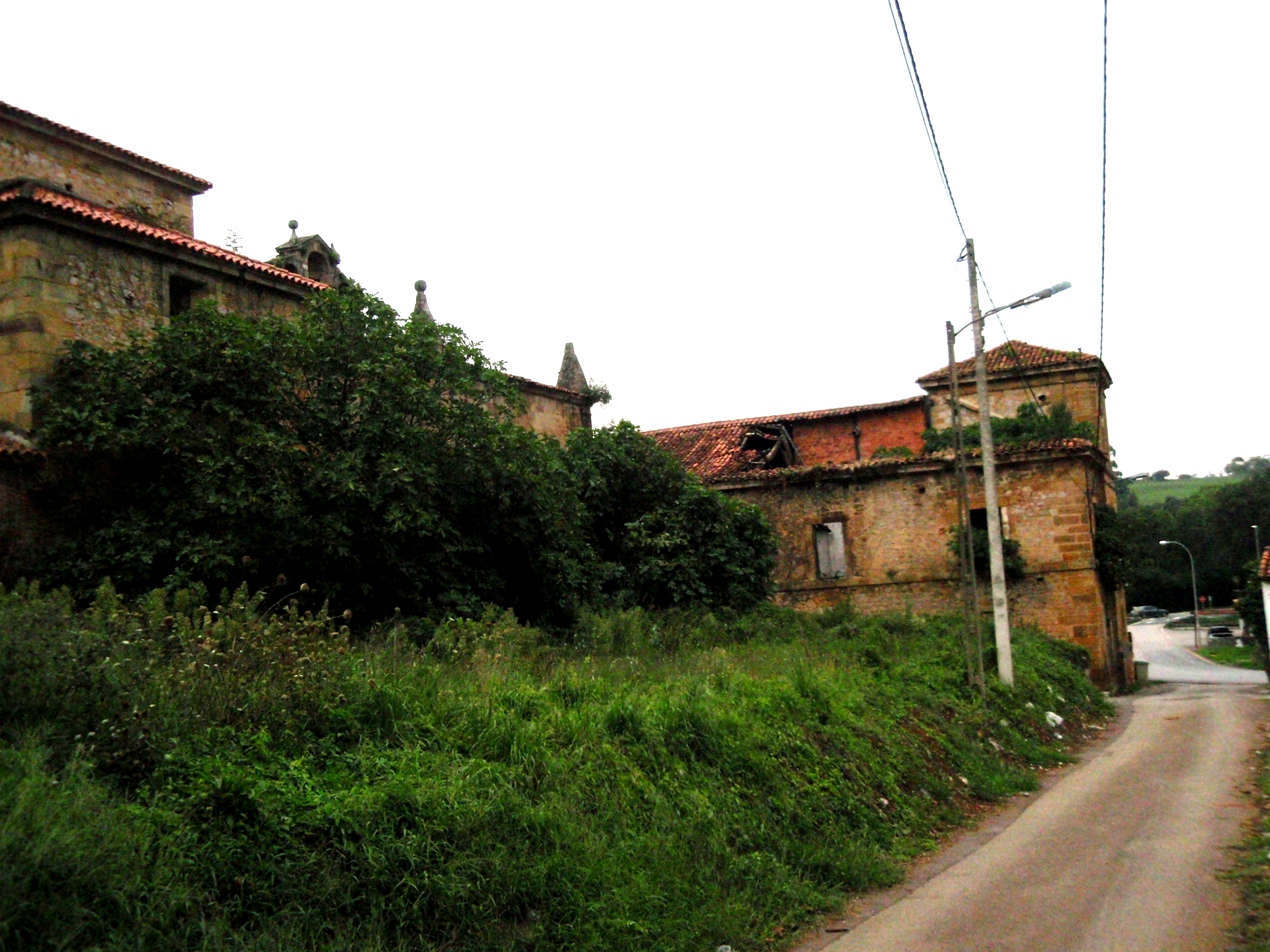 Vista parcial del Palacio de los Acebedos, en Hoznayo; Cantabria. Se encuentra abandonado.